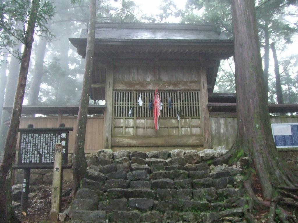 横倉宮の正面